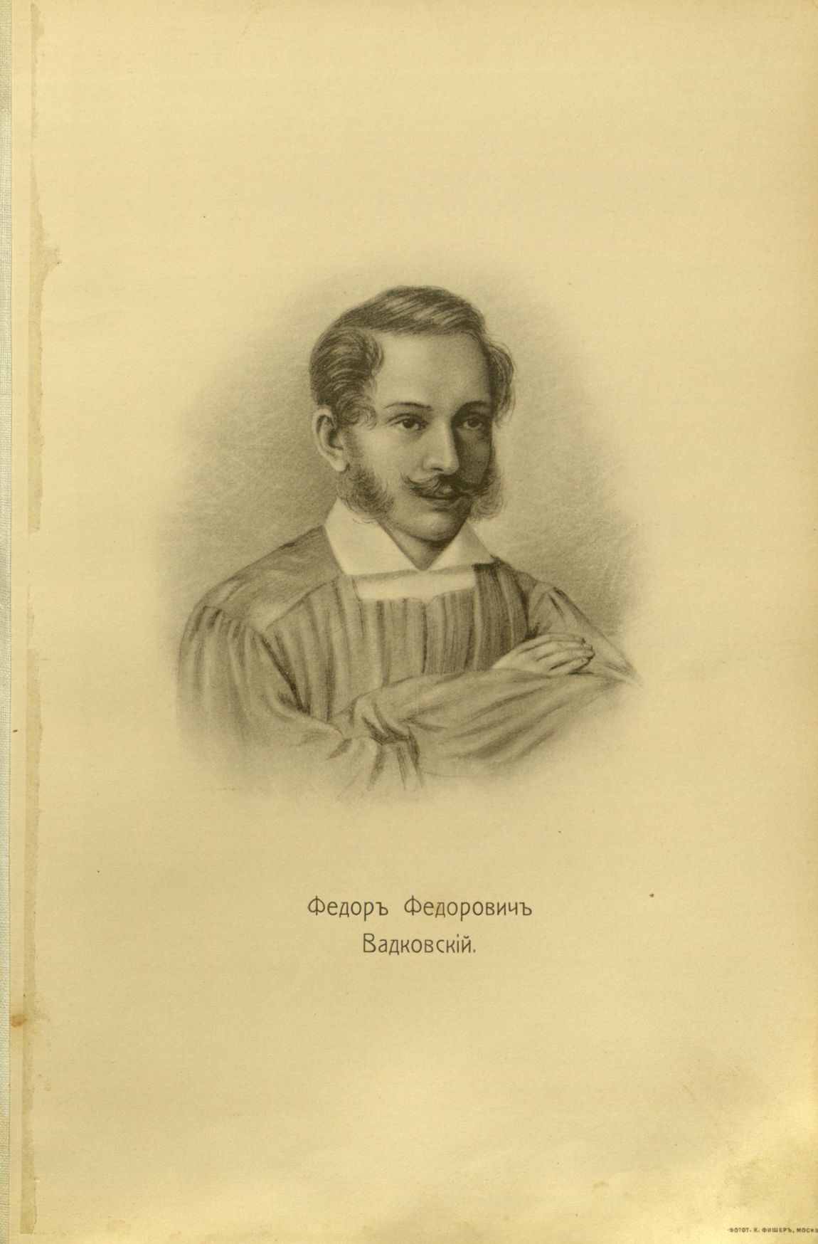 Головачев, П. М. Декабристы : 86 портретов, вид Петровского завода и 2 бытовых рисунка того времени. - М., [1906] Вадковский, Фёдор Фёдорович